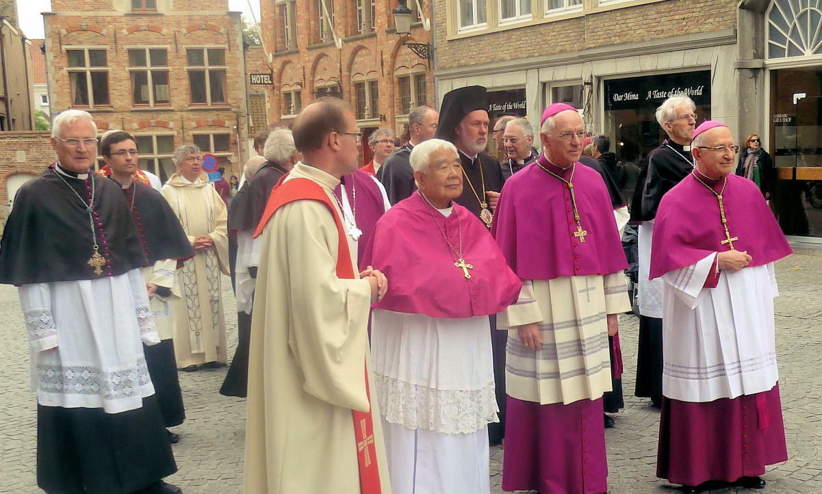 Hemelvaart 2015 Hemelvaart 2015 Kanunnik Joris Polfliet, Vicaris Bisdom Gent mgr. Joseph Ti-kang, Aartsbisschop van Taipei mgr. Berloco, apostolisch Nuntius * mgr. Johannes Liesen, Nederlands Bisschop (not in this picture) mgr. Gérard Coliche, Frans Bisschop mgr. Athenagoras Peckstadt, Bisschop De abt van Steenbrugge, OSB